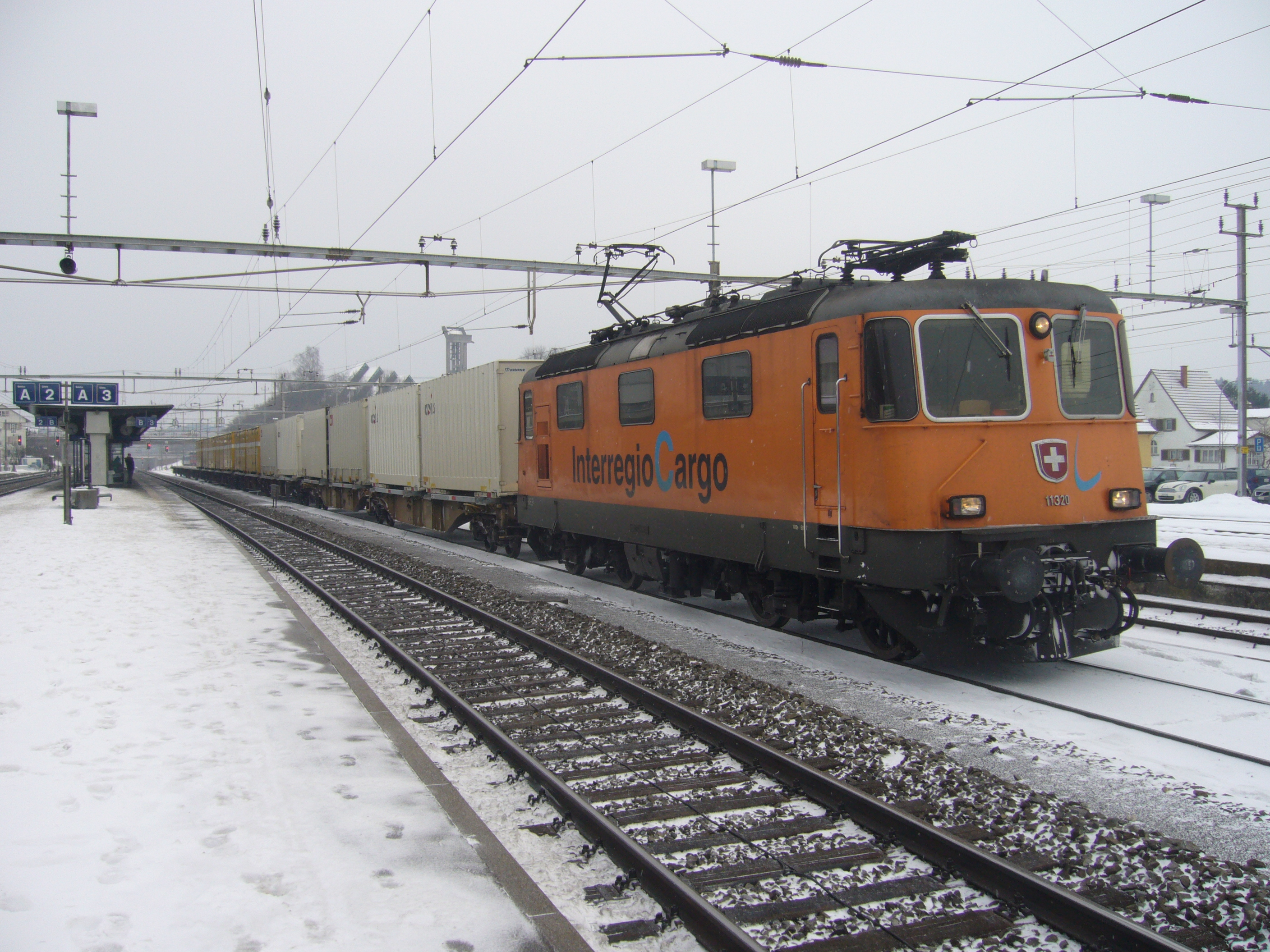 Locomotive Re 4/4II 11320 mit orange-farber InterregioCargo-Bemalung vor Container-Zug im Bahnhof Effretikon.